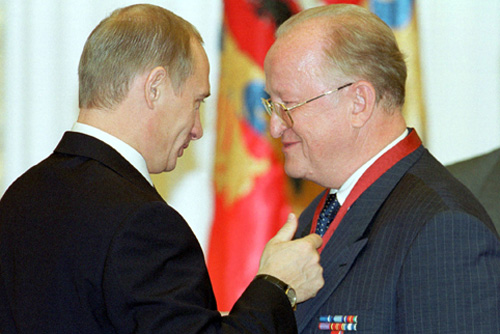 МОСКВА, КРЕМЛЬ. Церемония вручения государственных наград. Орден «За заслуги перед Отечеством» IV степени вручен Председателю Центрального банка Виктору Геращенко.